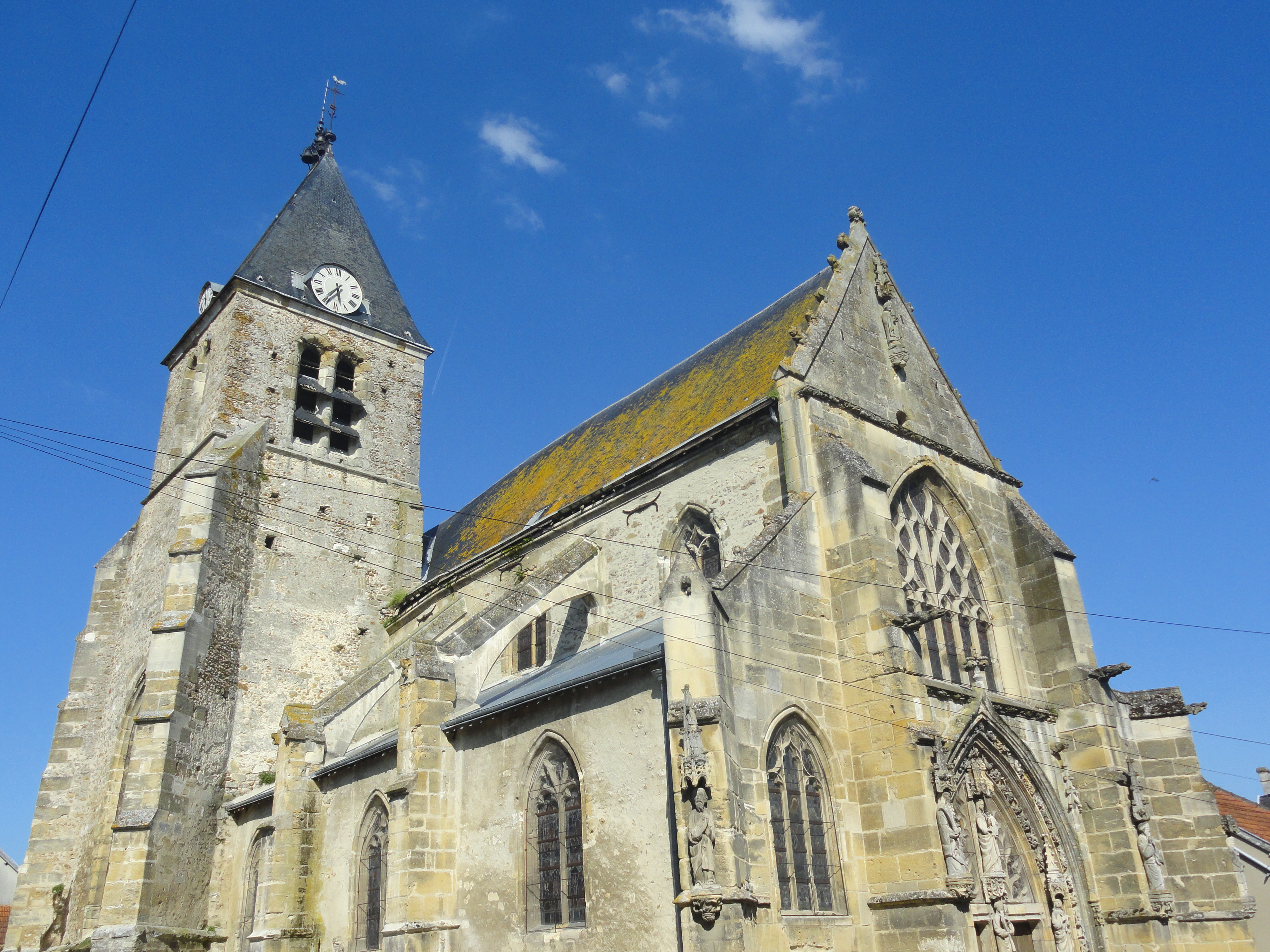 L'église Saint-Trésain d'Avenay-Val-d'Or (Marne, France) depuis l'ouest.